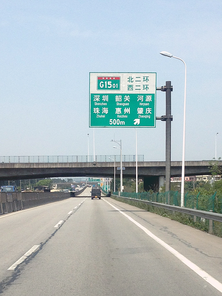 广清高速公路上的指示牌